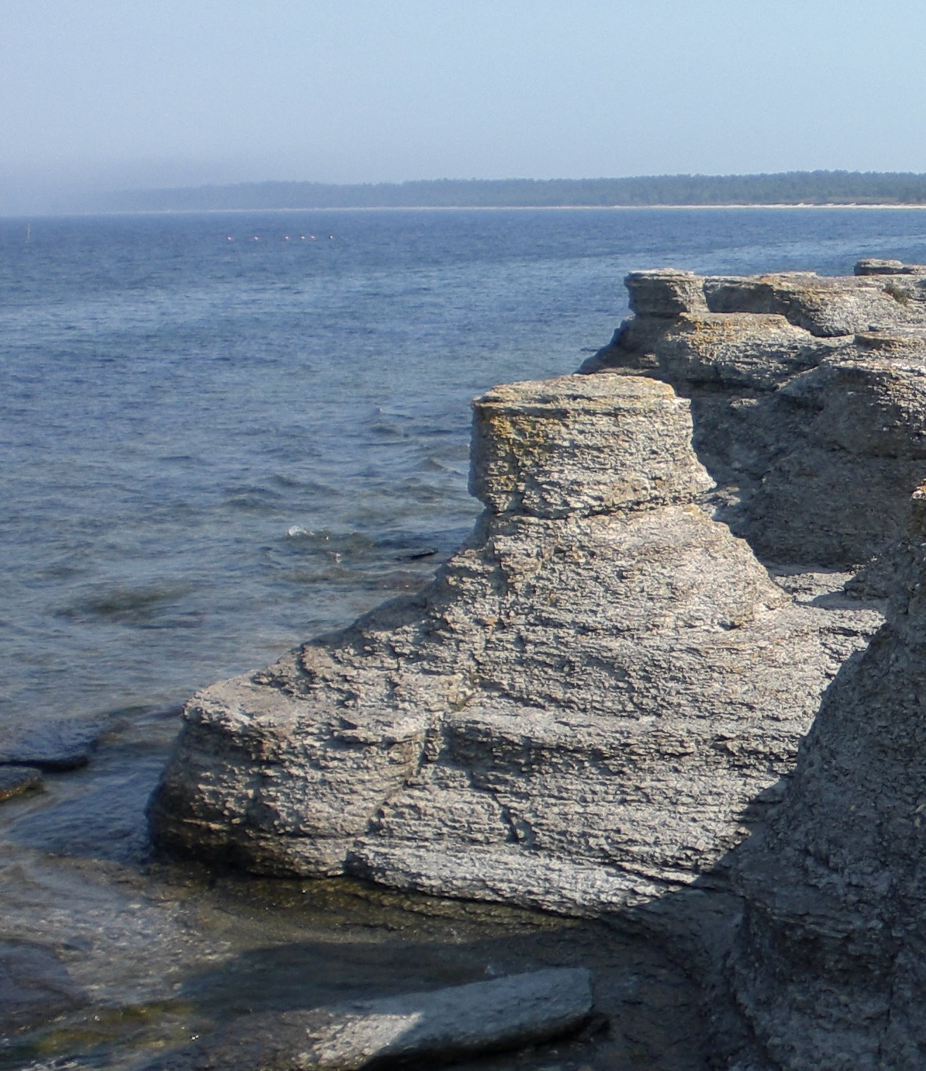 Raukensteine bei Byrum auf Öland, Schweden